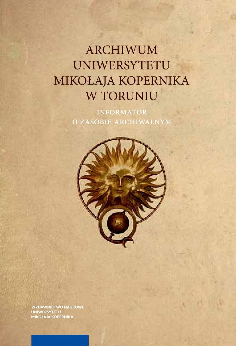 Okładka informatora o zasobie Archiwum UMK.